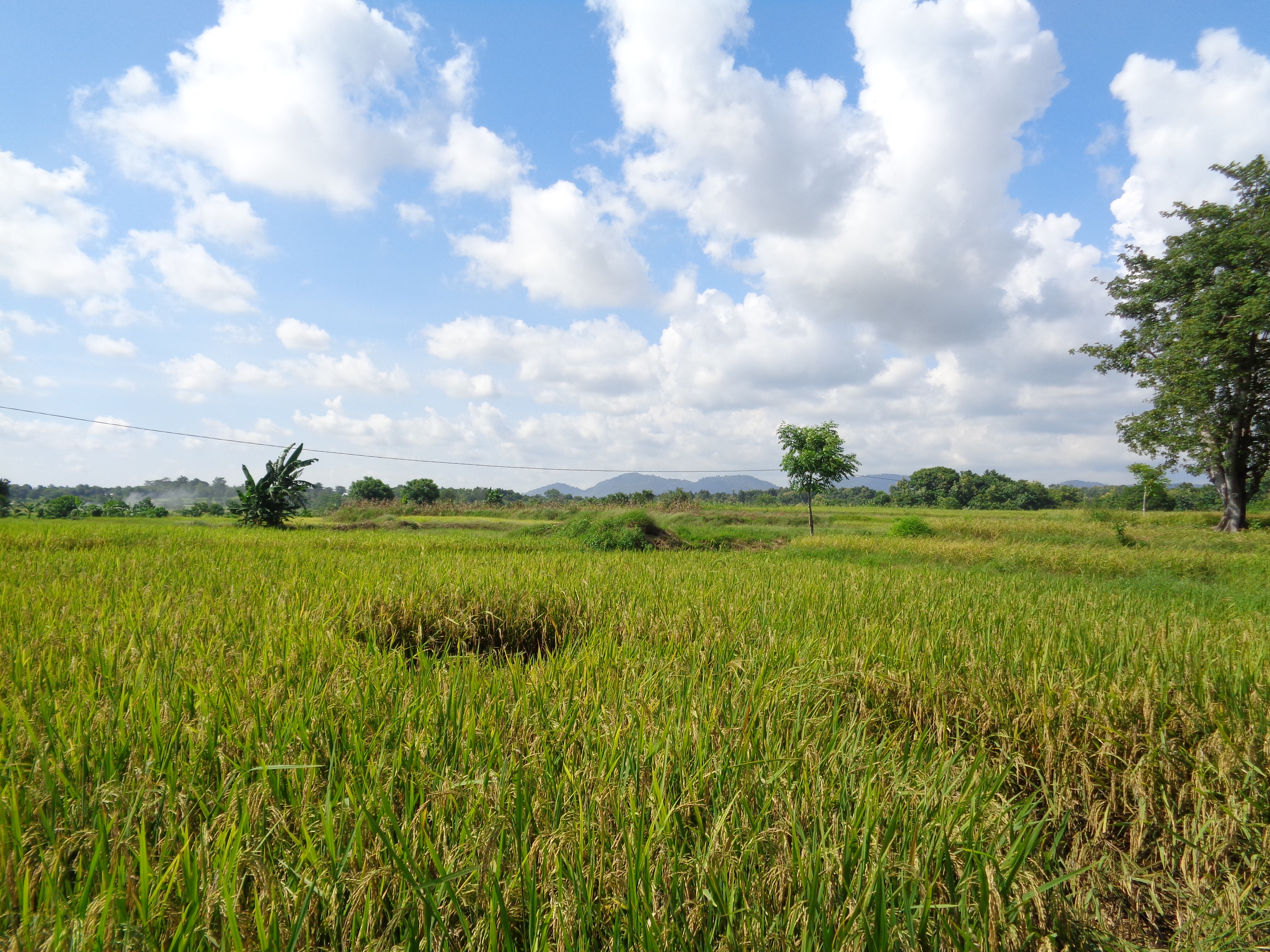 Jeneponto dikenal sebagai kabupaten yang memiliki iklim kering. Tapi ada bagian lain dari Jeneponto yang ternyata memiliki curah hujan melimpah, yaitu di Kecamatan Bangkala Barat. Kecamatan ini berbatasan langsung dengan Kabupaten Takalar dan Kabupaten Gowa, dimana sebagian besar masyarakatnya berprofesi sebagai petani.